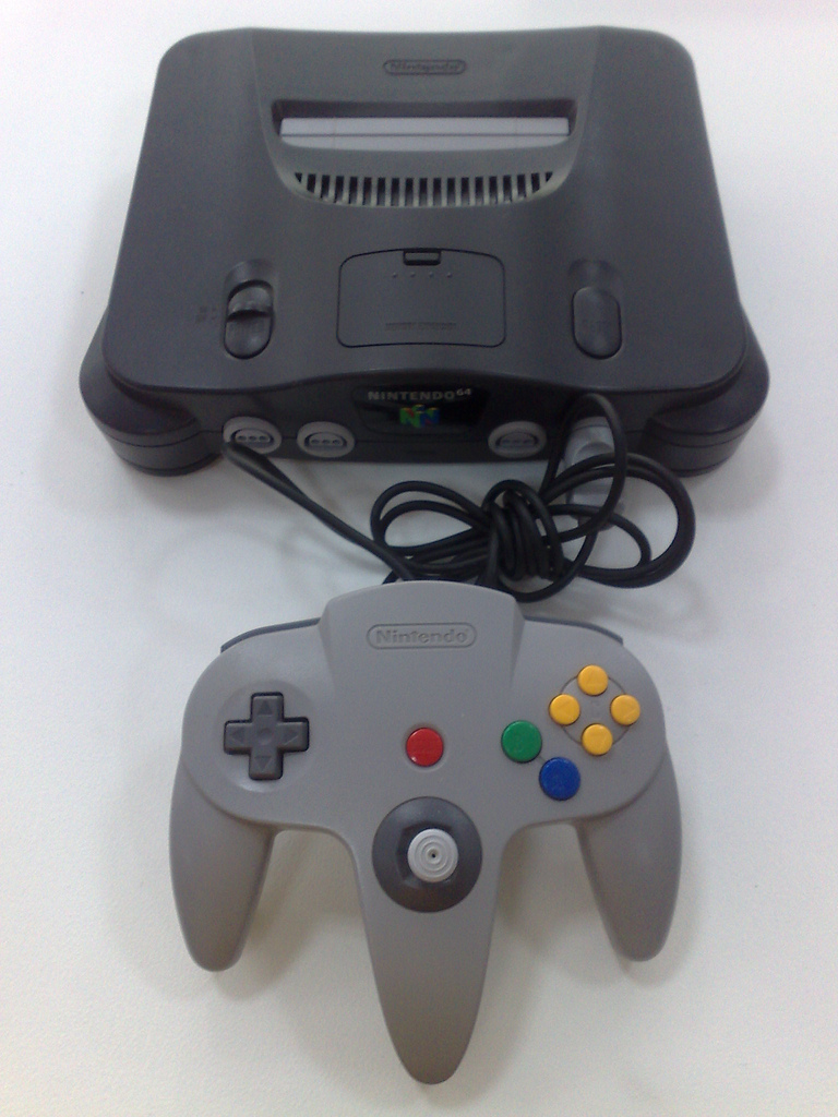 La consola más exitosa para lo horrible que es su control. Visto en la colección de consolas del Gamexpo.